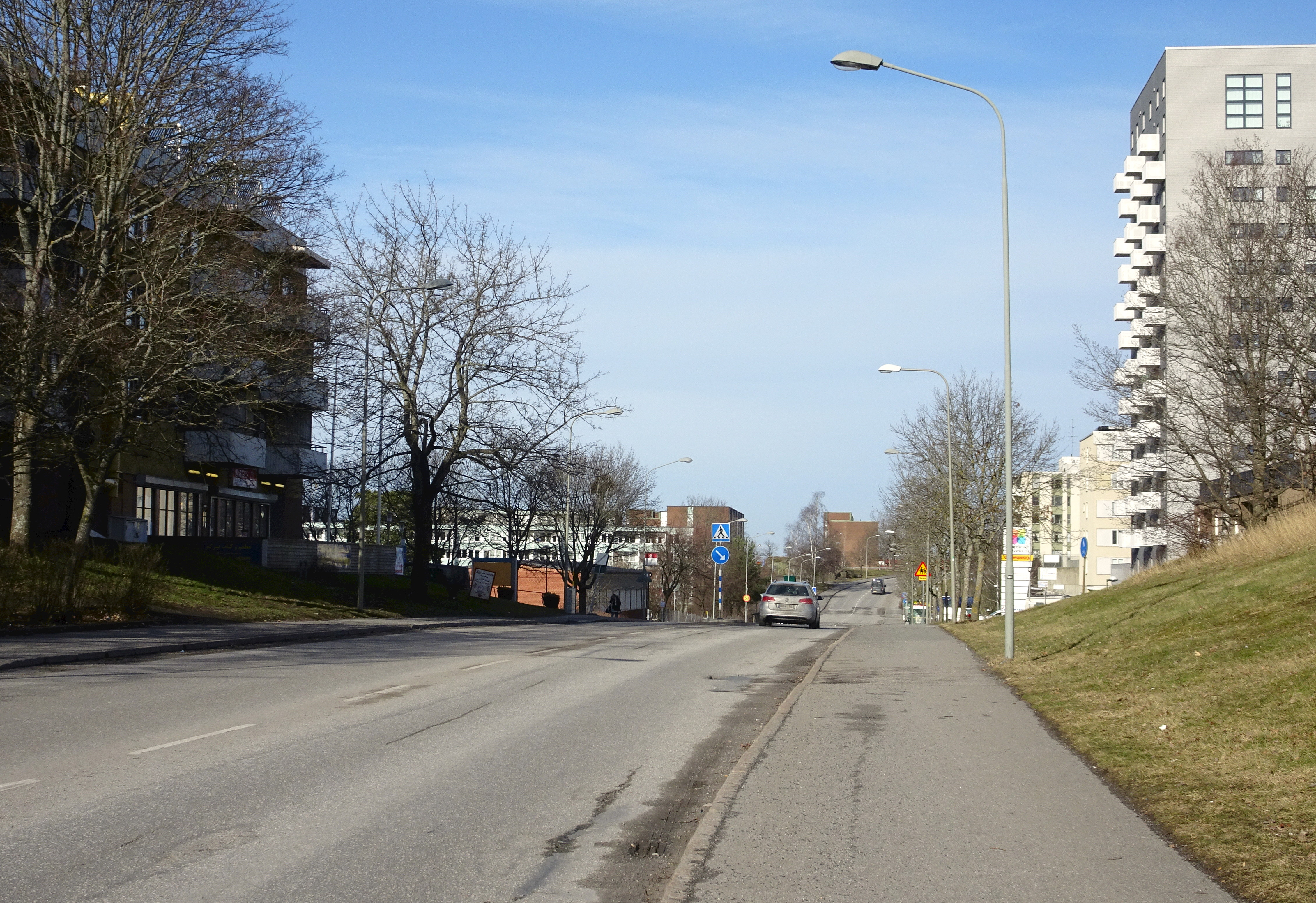 Vägen Vårholmsbackarna, vy norrut strax söder om Vårberg centrum